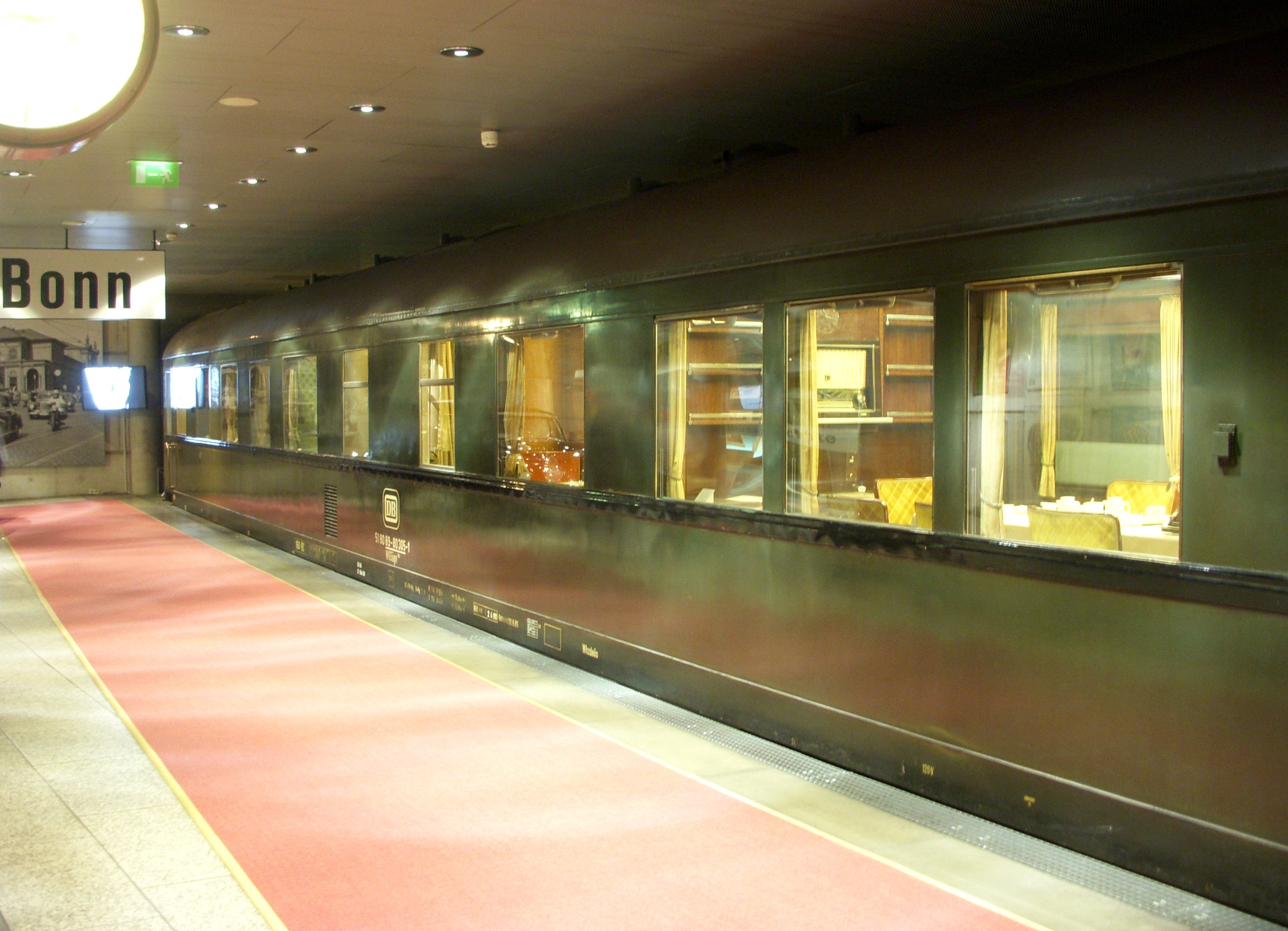 Haus der Geschichte i Bonn, regeringståget